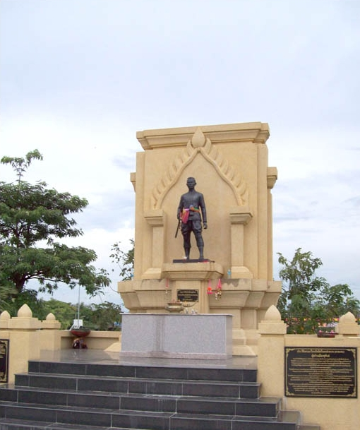 อนุสาวรีย์พระยาไกรภักดีศรีนครลำดวน (ตากะจะ) ผู้สร้างเมืองขุขันธ์ประดิษฐานอยู่ข้างที่ว่าการอำเภอ